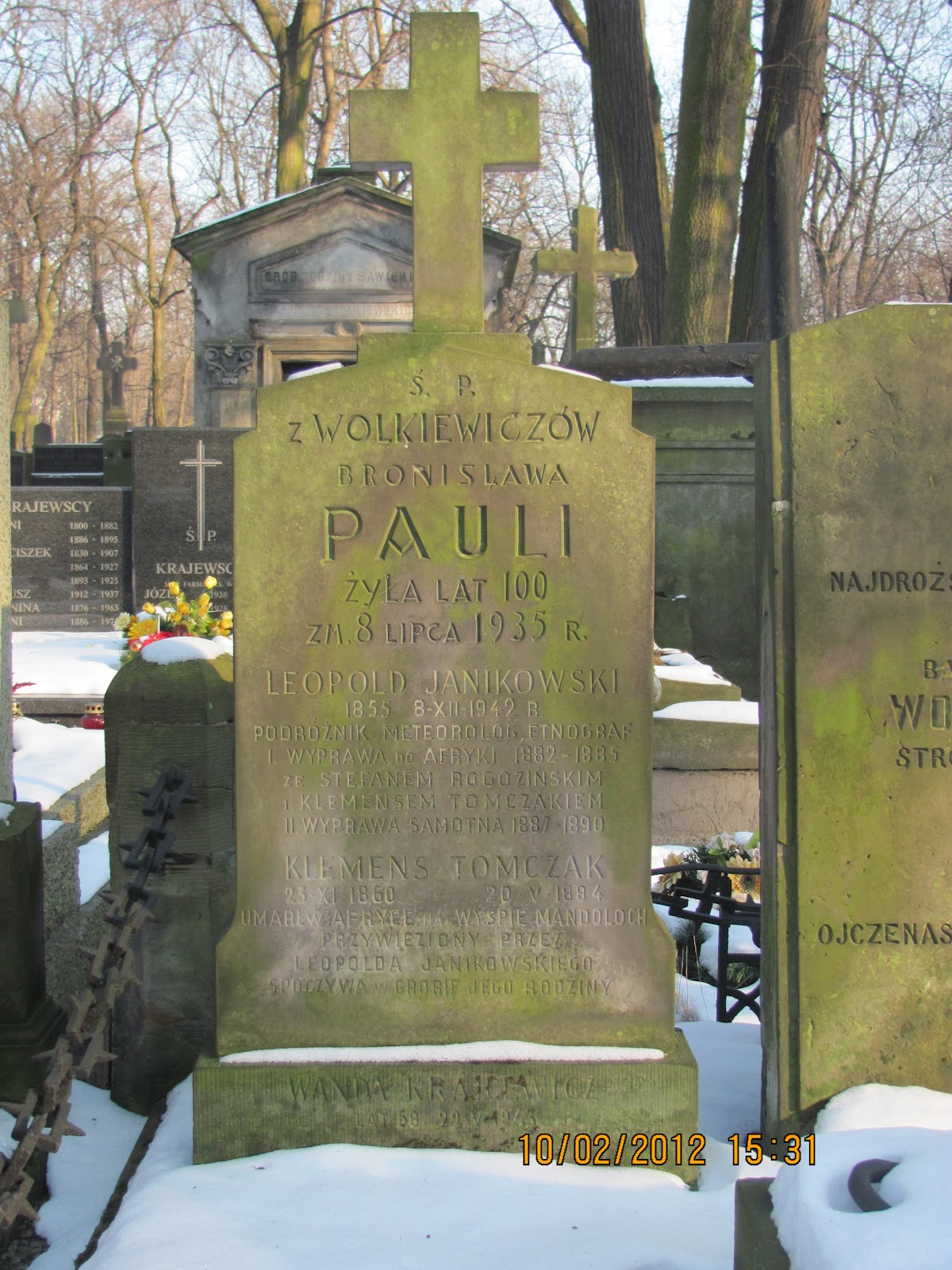 Grób Klemensa Tomczaka na warszawskich Powązkach